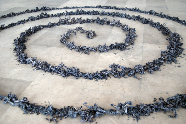 Spirala straha - Selman Trtovac